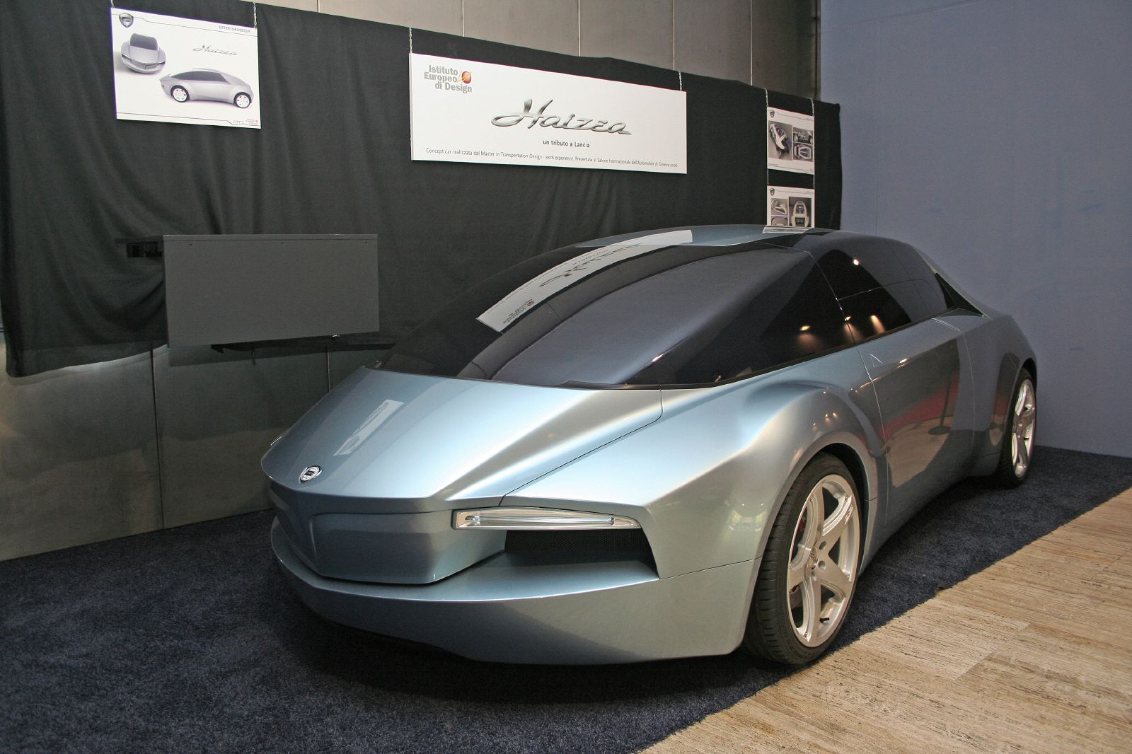 Lancia Haizea prototipo Istituto Europeo di Design del 2006